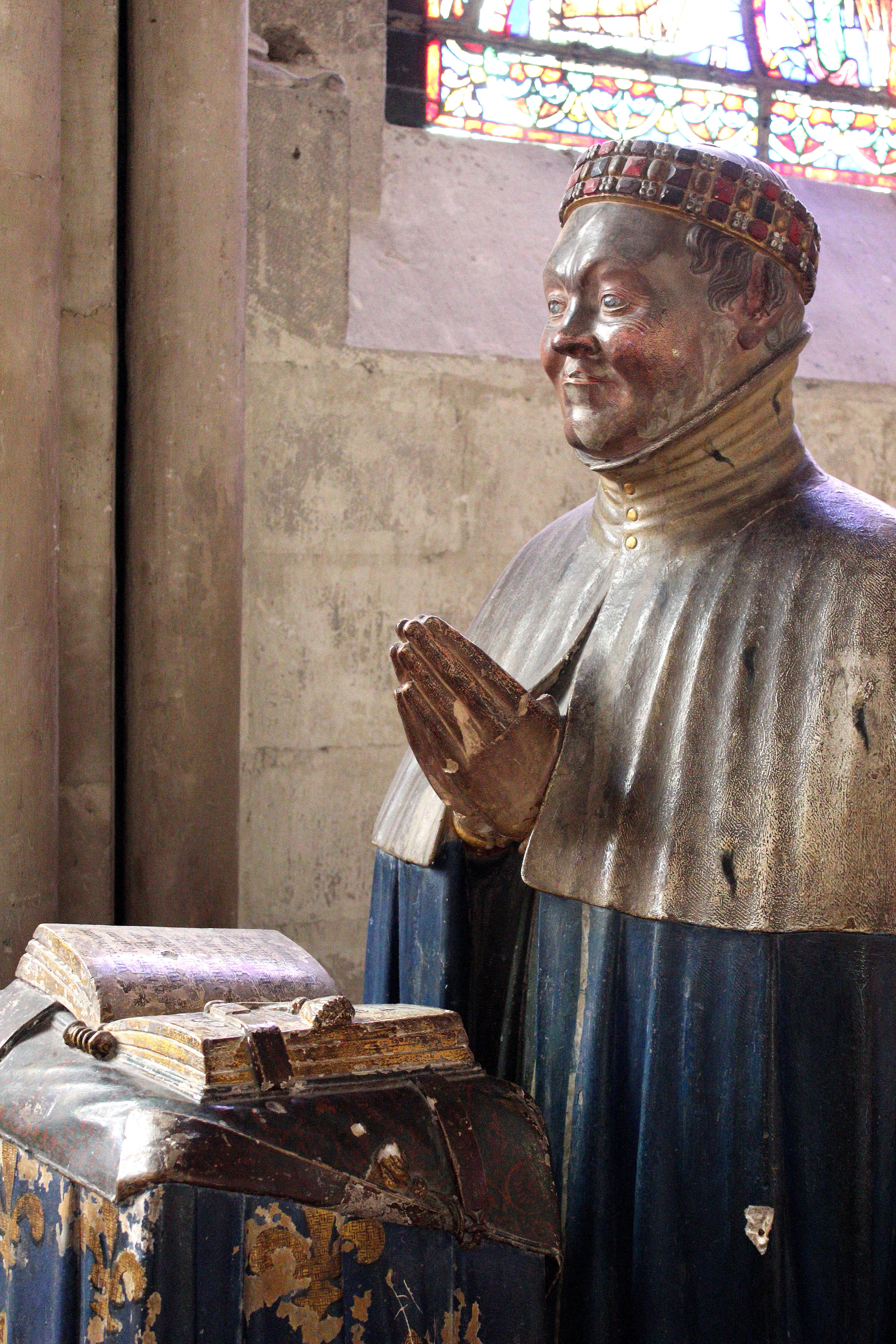 Cathédrale Saint-Étienne de Bourges. Priant du duc Jean de Berry dans l'abside